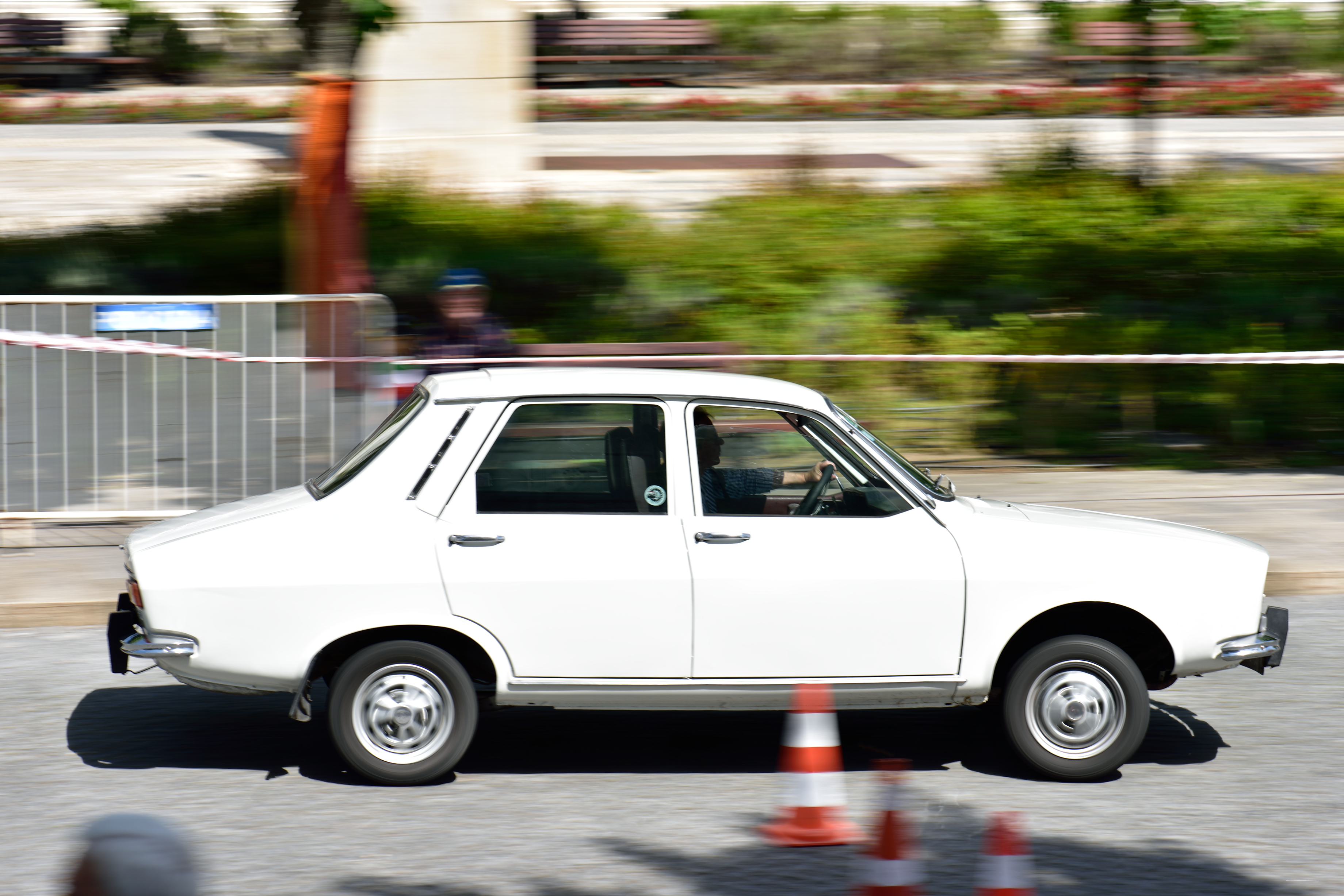 Castelo Branco Classic Auto - 10MAI02015